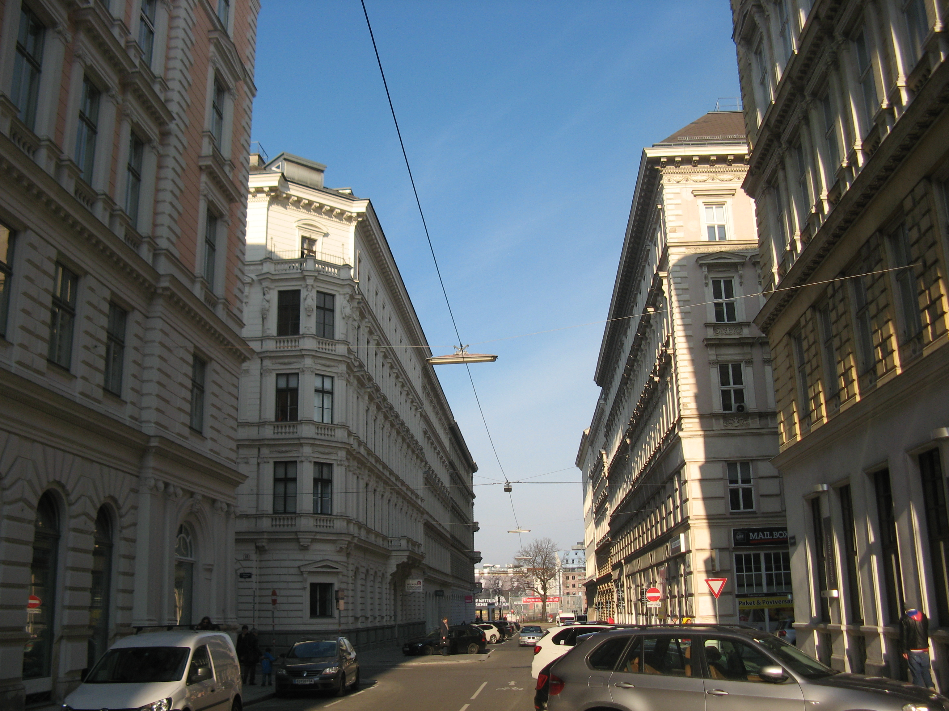 Esslinggasse von der Gonzagagasse in Richtung Nordosten, Wien-Innere Stadt